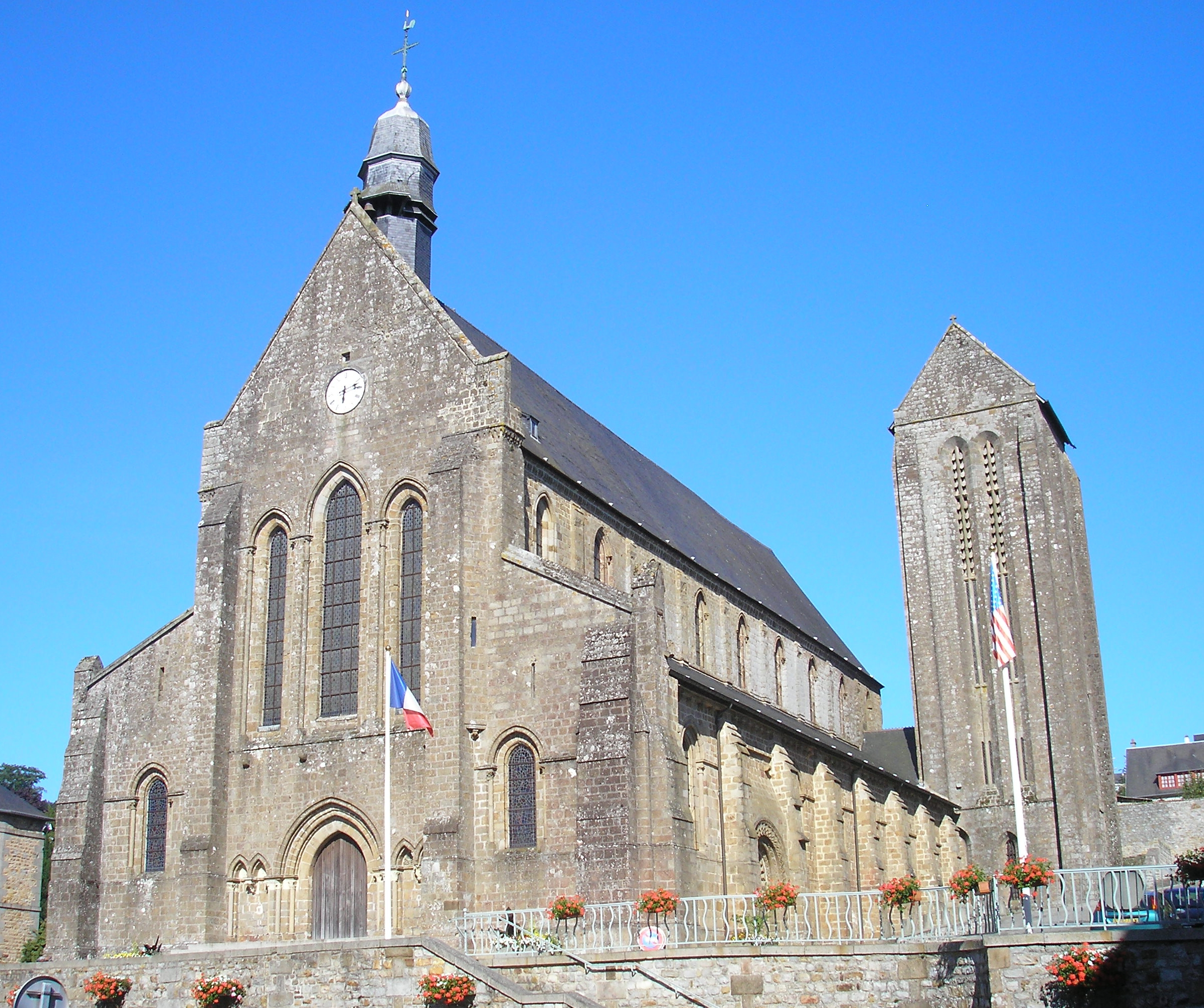 Mortain (Normandie, France). La collégiale Saint-Évroult.